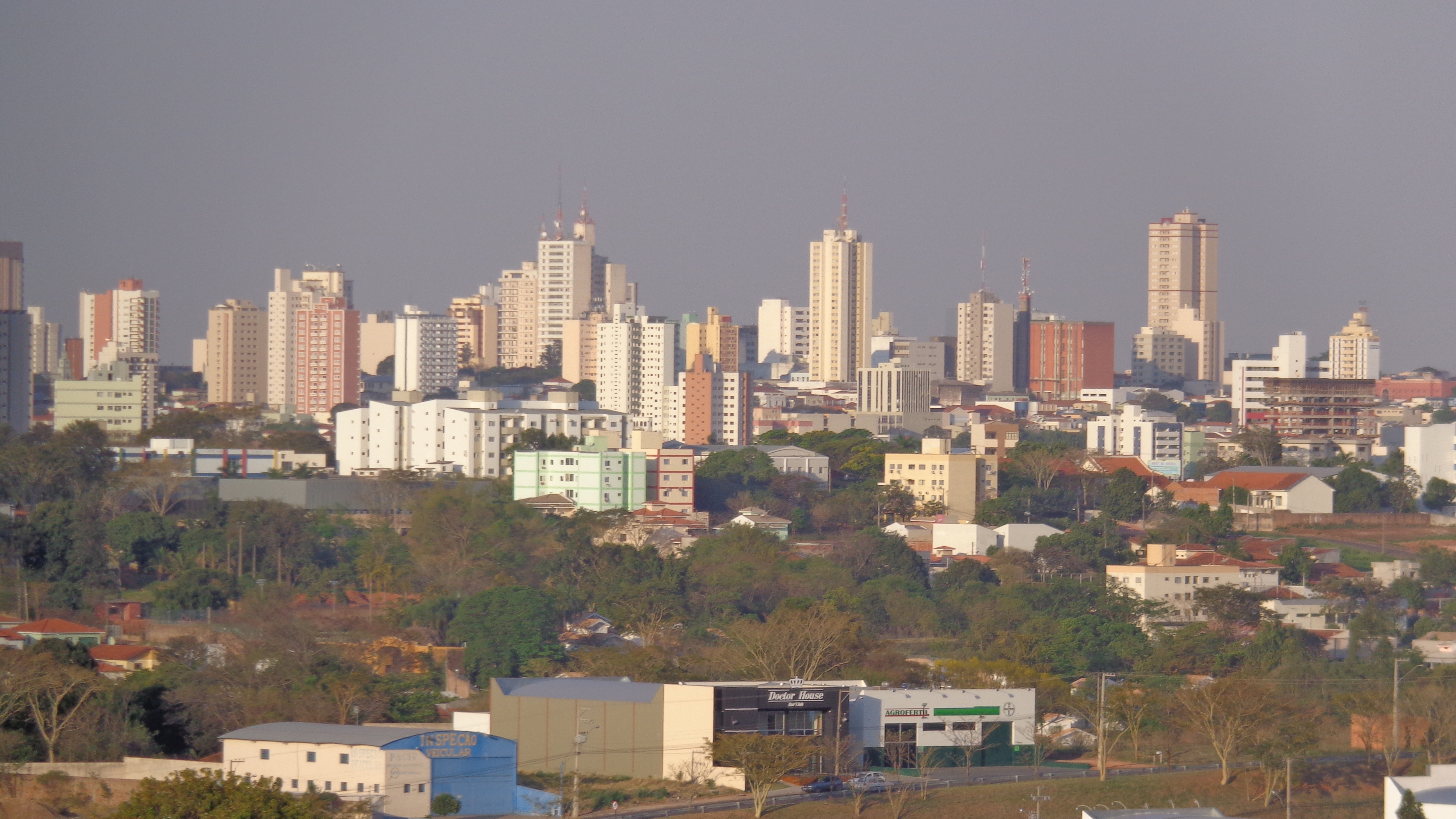 Skyline Presidente Prudente